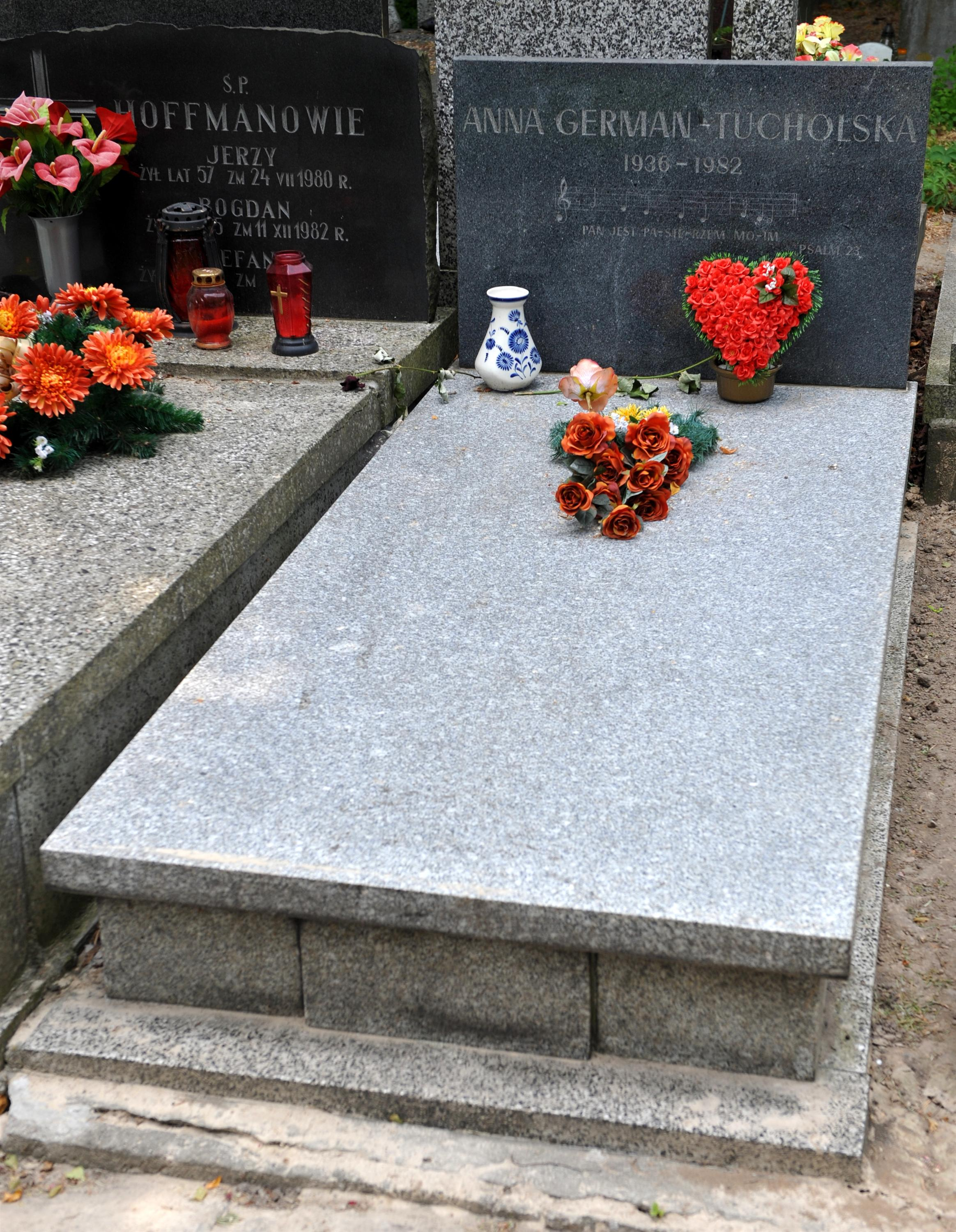 Grób Anny German-Tucholskiej na warszawskim Cmentarzu Ewangelicko-Reformowanym